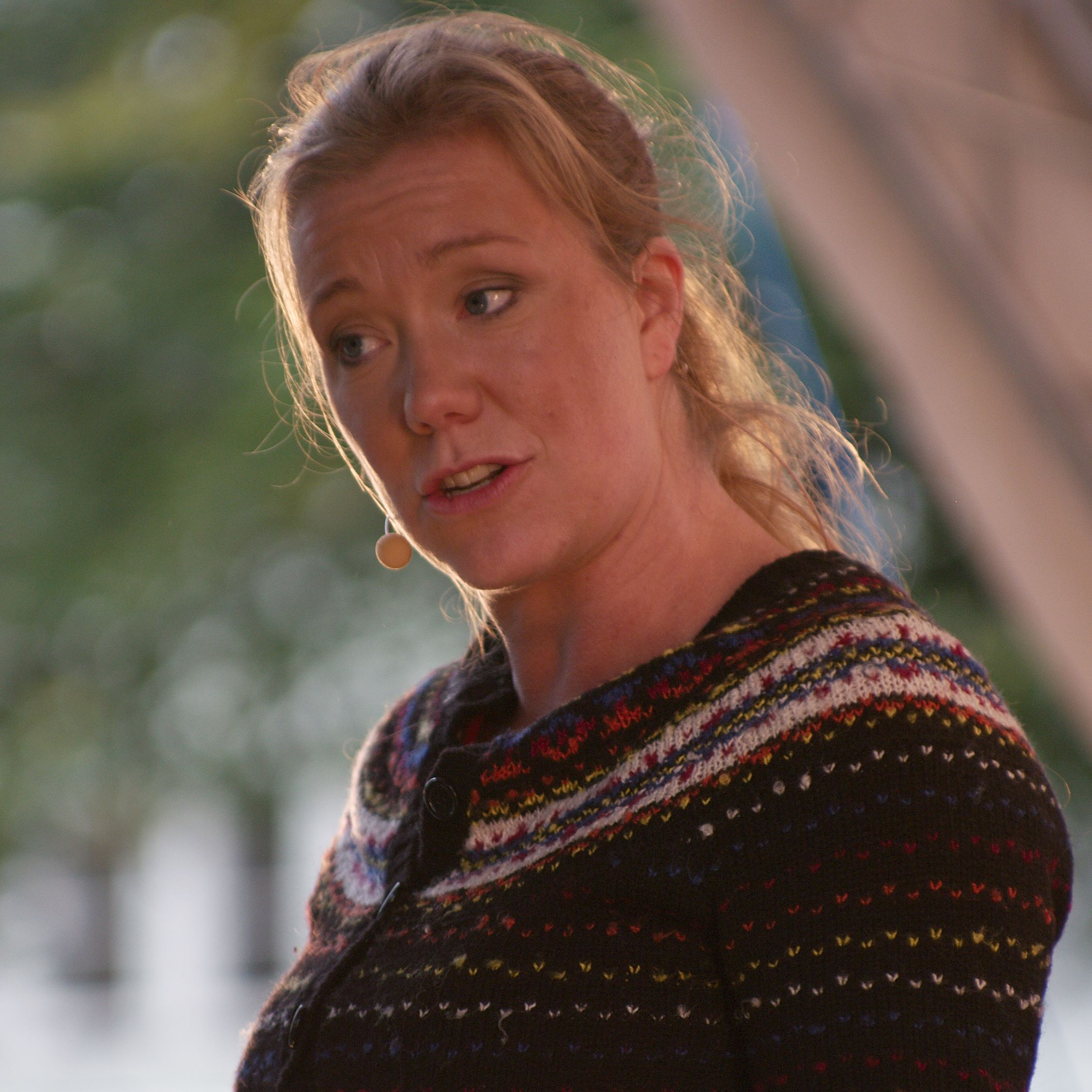 Vera Michaelsen @ Oslo bokfestival 2011.